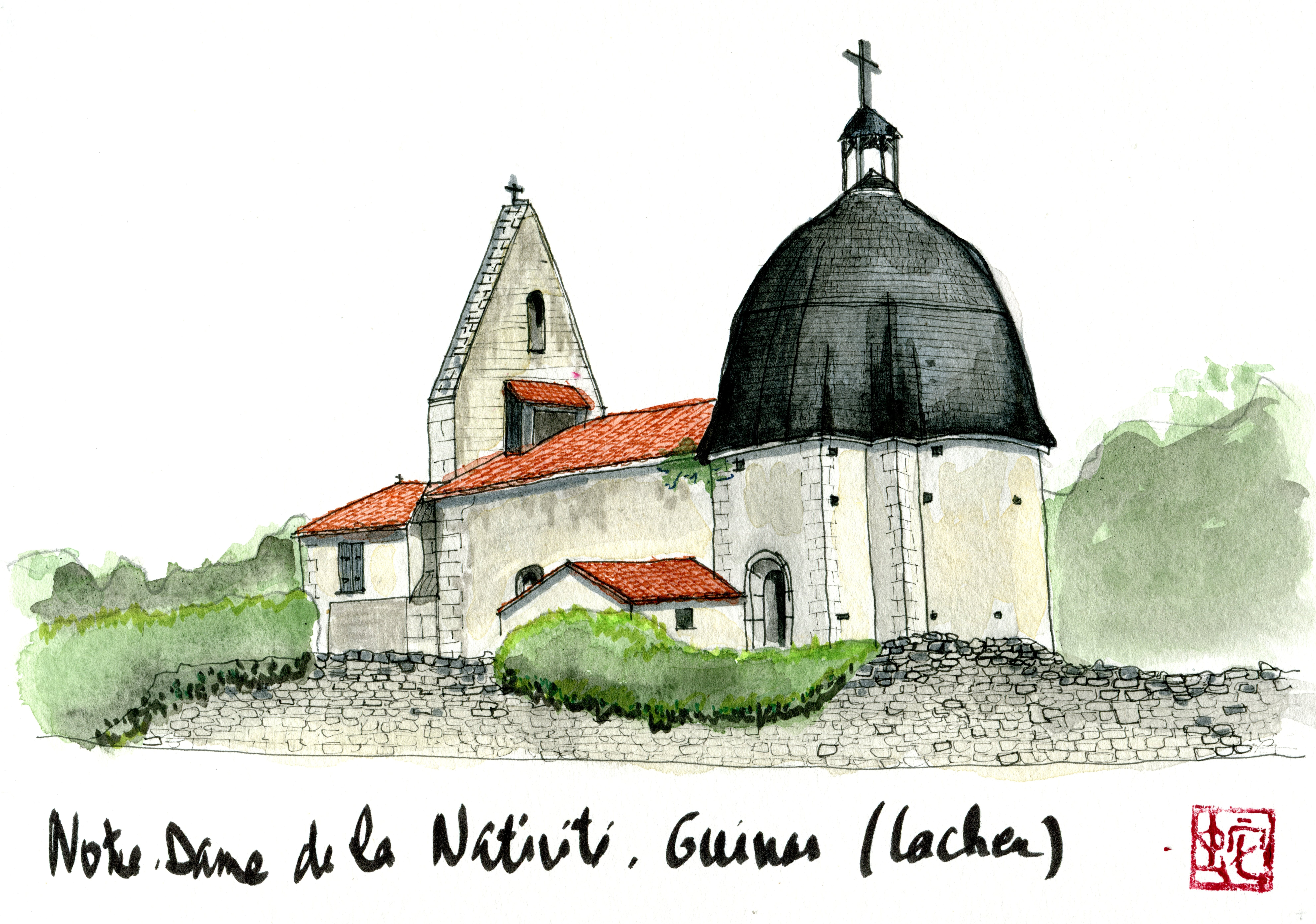 Aquarelle de l'église Notre-Dame de la Nativité à Guinas, sur la commune de Cachen dans le département français des Landes.